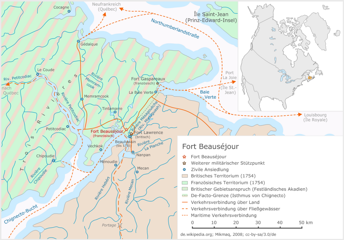 Fort Beauséjour (Regionkarte)